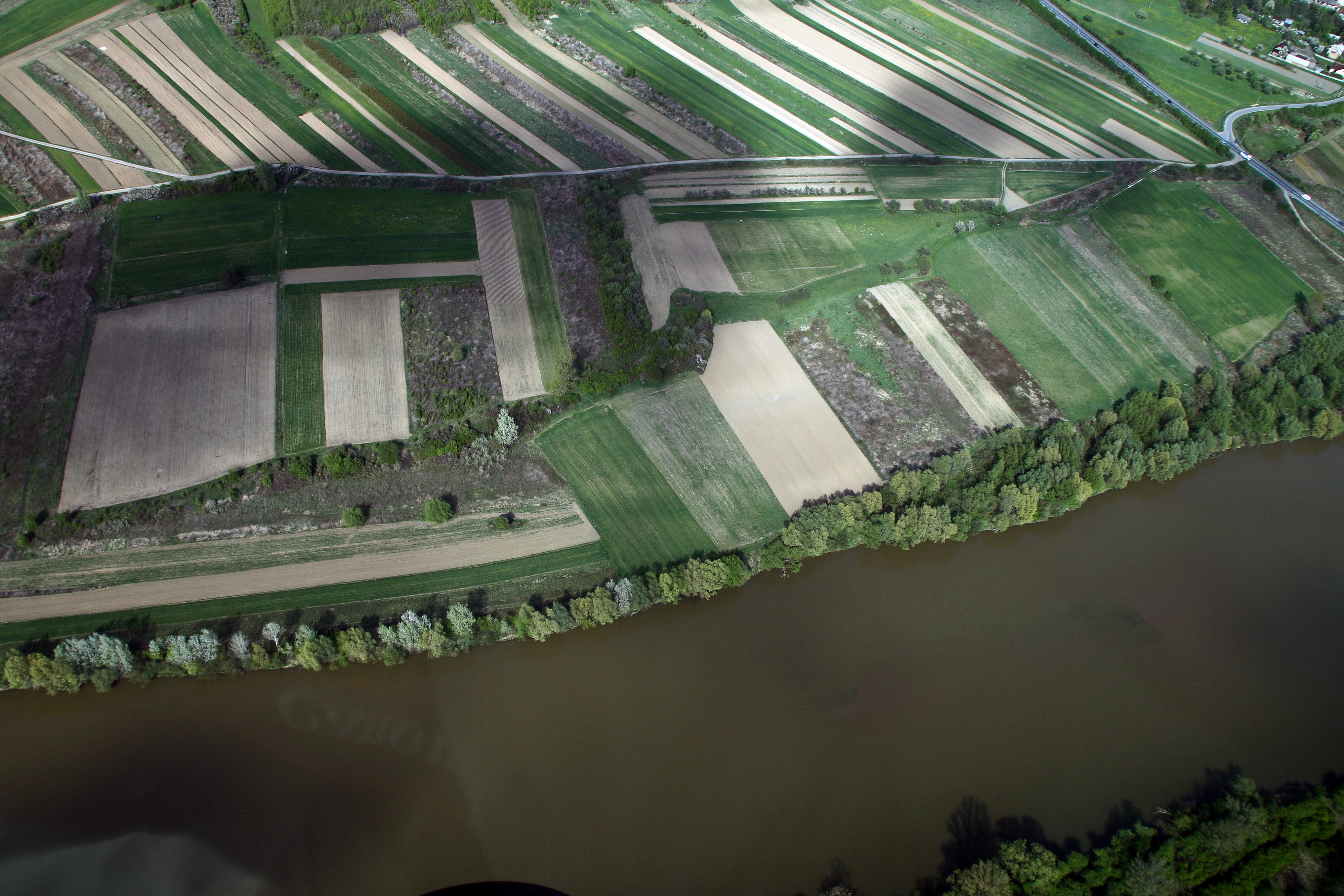 Specjalny obszar ochrony siedlisk Dolina Dolnego Sanu. This is a photography of Natura 2000 protected area with ID PLH180020